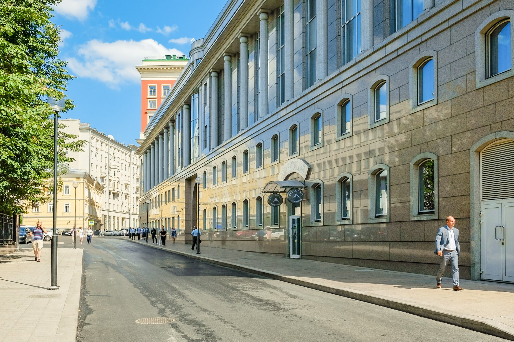 Вознесенский переулок после реконструкции в 2016 году